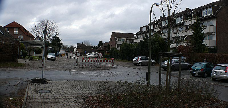 Recklinghausen Stuckenbusch, eigenes Foto